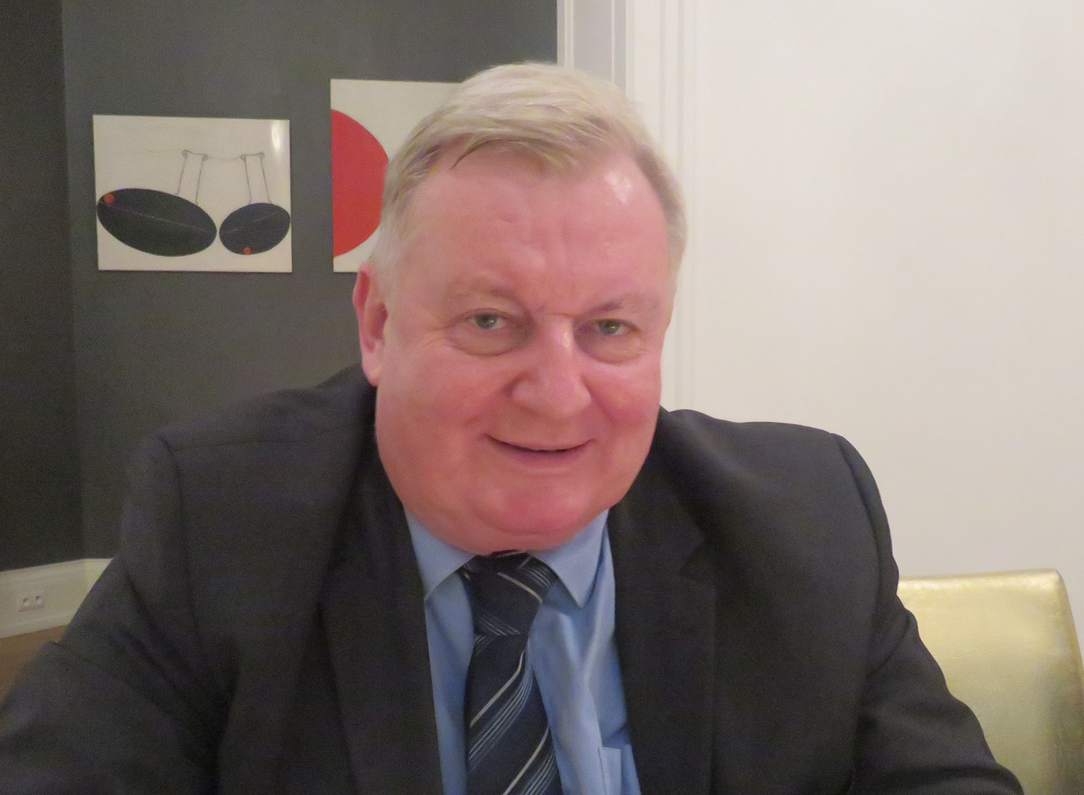 Jacek Łukomski